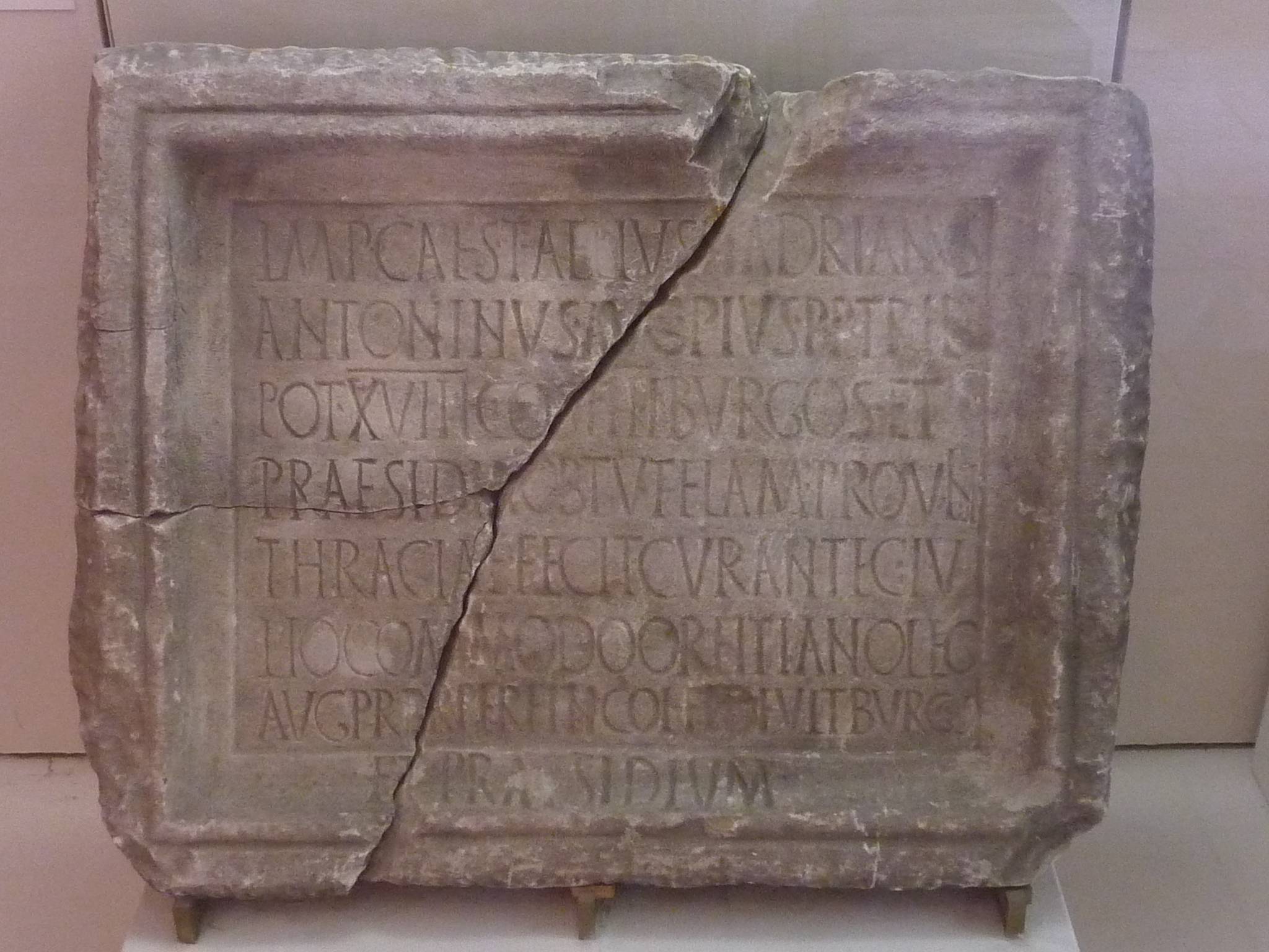 Inscription latine d'époque romaine trouvée à Panéevo et commémorant la construction de fortifications pour la défense de la province. Texte latin : "Imp(erator) Caes(ar) T(itus) Aelius Hadrian[u]s/ Antoninus Aug(ustus) Pius, p(ater) p(atriae), tri[b(unitia)]/ pot(estate) XVIII, co(n)s(ul) IIII, burgos et / praesidia ob tutelam provin(ciae) / Thraciae fecit, curante C(aio) Iu/lio Commodo Orfitiano, leg(ato) / Aug(usti) pr(o) pr(aetore), per fin(es) col(oniae) Fl(auiae) Deult(ensium) burg[u]s / [e]t praesidium." Date : 155. Référence AE 1927, 49.